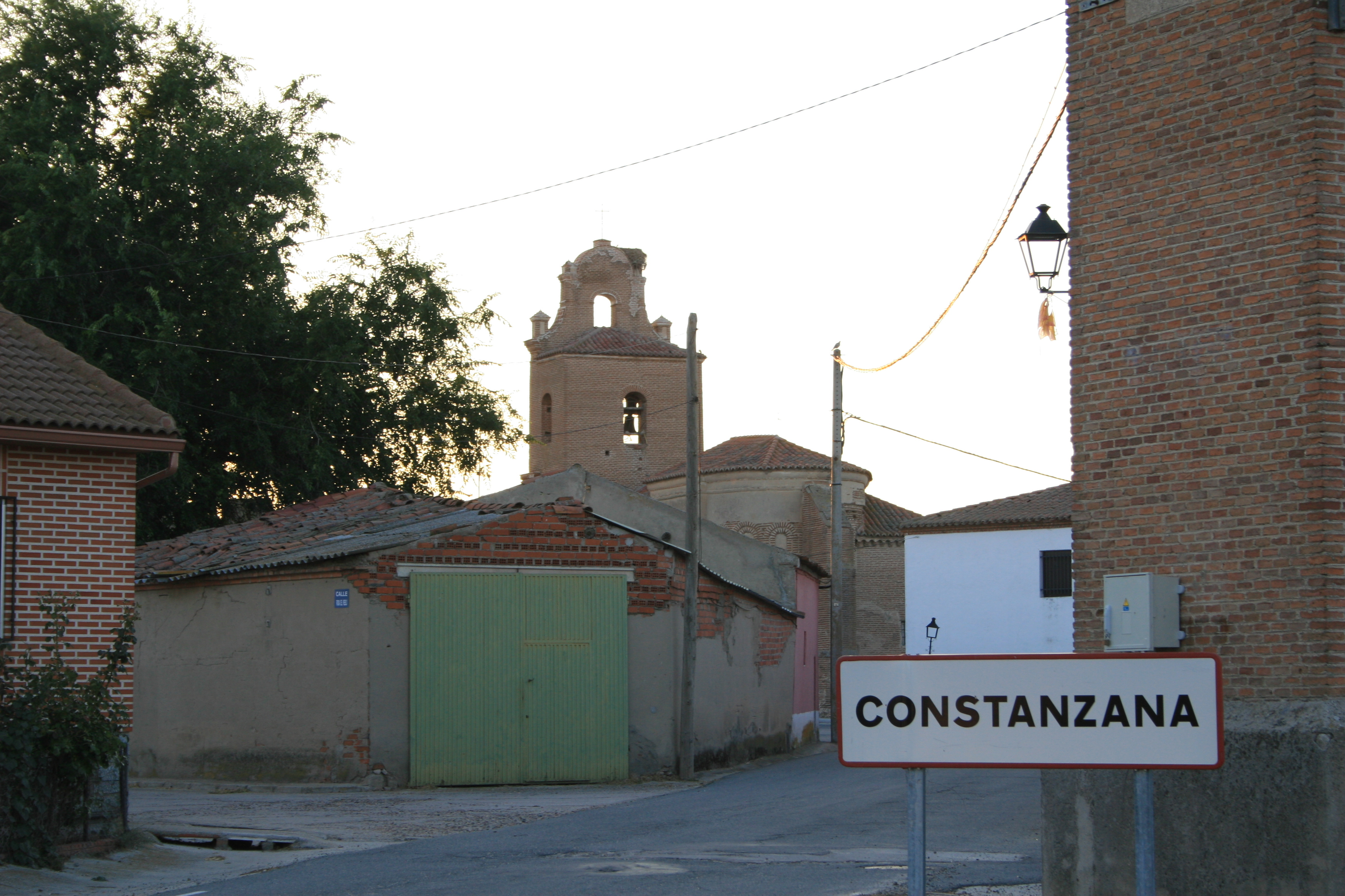 Constanzana